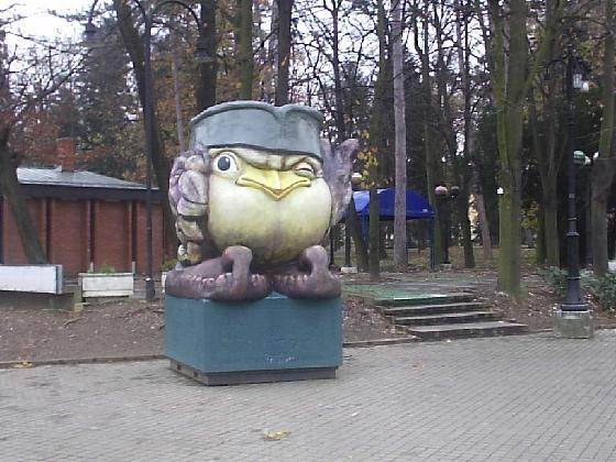 Врабац (Џивџан) маскота Врњачке Бање